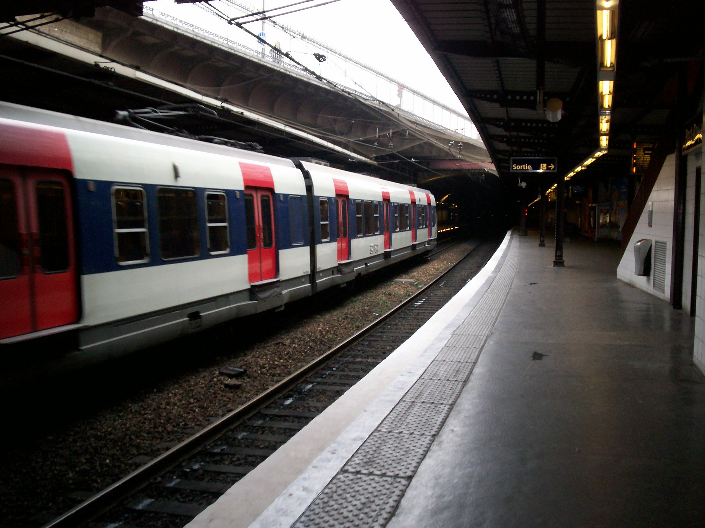 MI 79 - Gare de Port-Royal